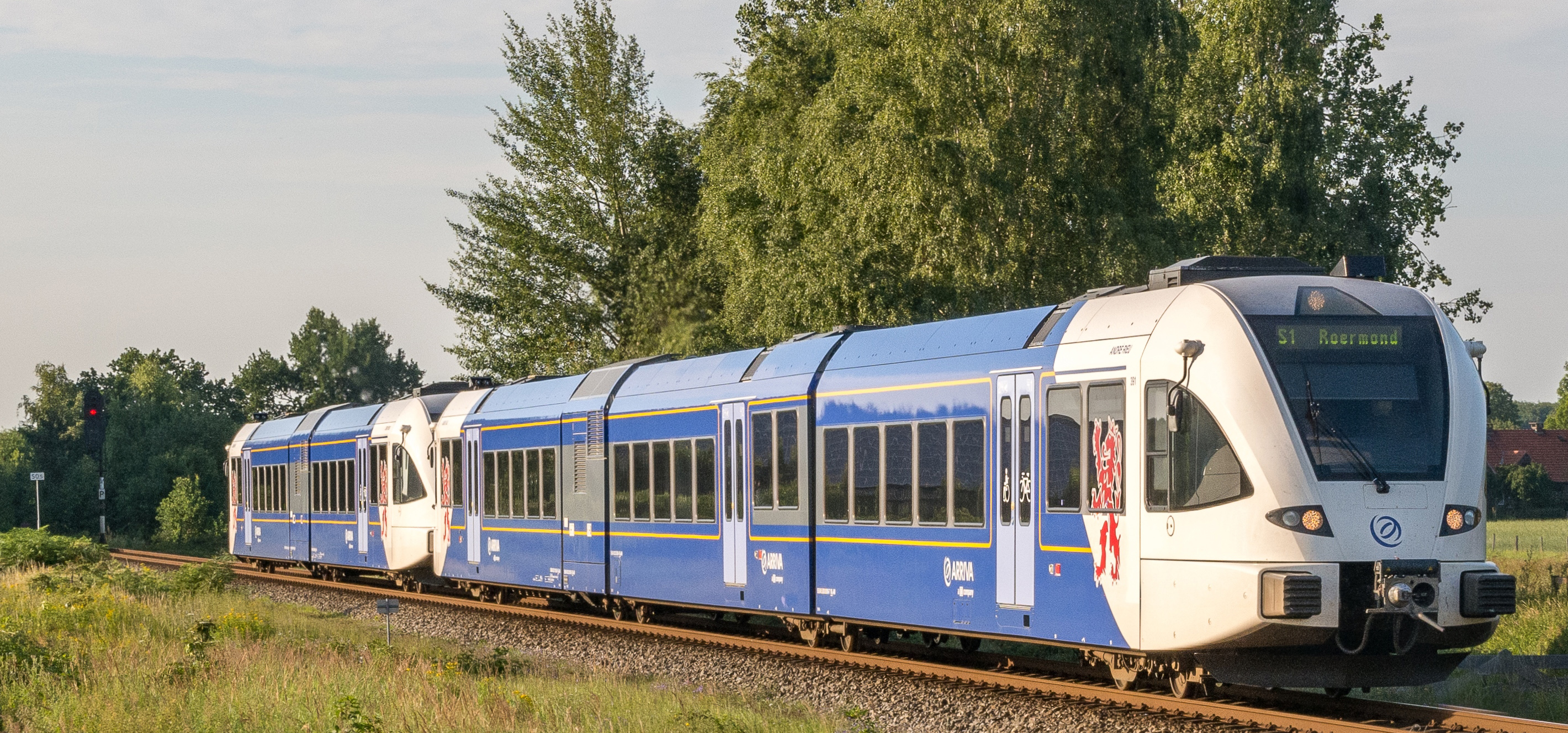 Tijdens de Vierdaagse van Nijmegen rijdt Arriva op de Maaslijn van 's-morgensvroeg tot 's-avonds laat voornamelijk met langere treinen. Bij Holthees komen Arriva GTW 391-281 als trein 32268 naar Roermond, voorbij.